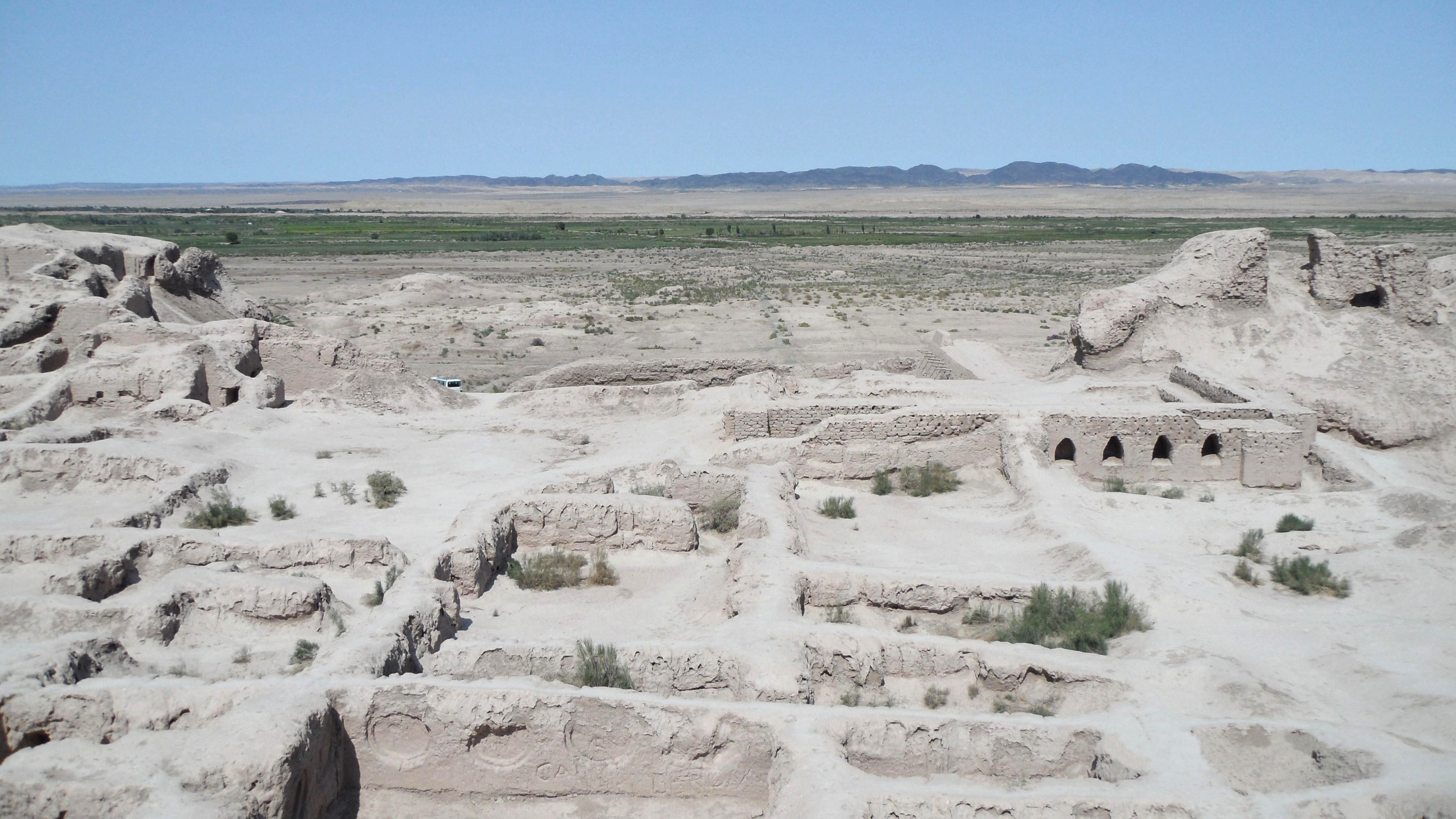 Toprak Kale - Festung aus der Kuschanenzeit in Choresm